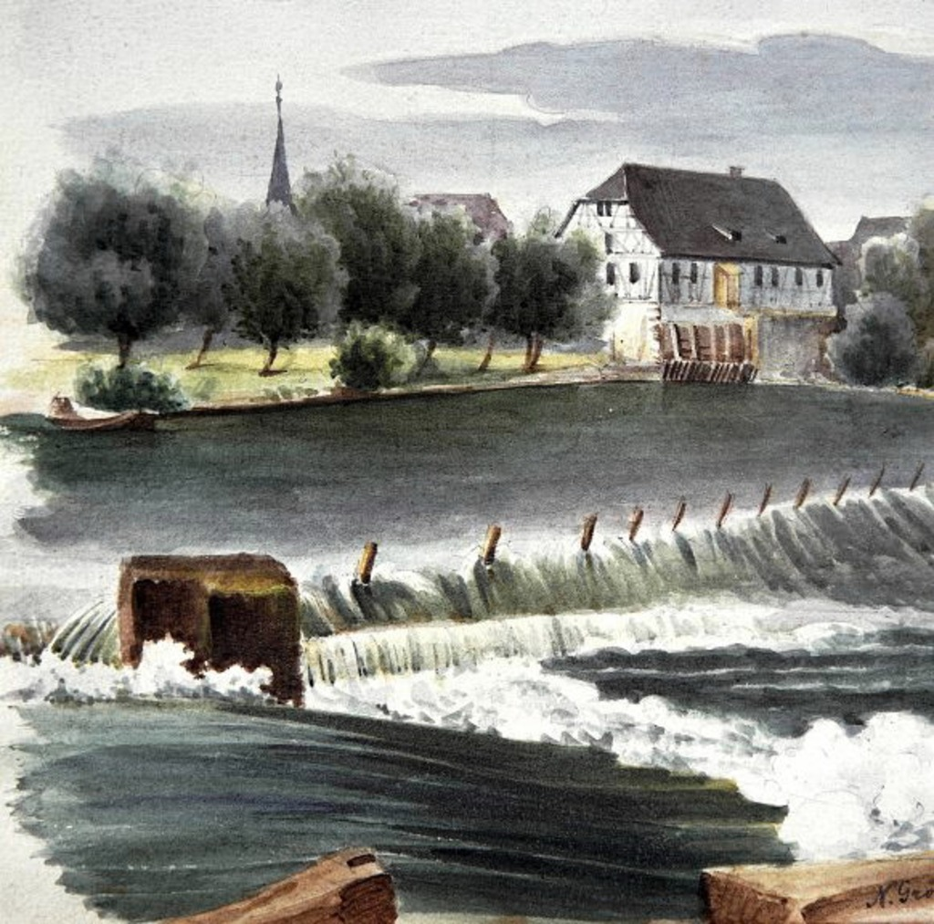 Blick über das Neckarwehr. (Aquarell)